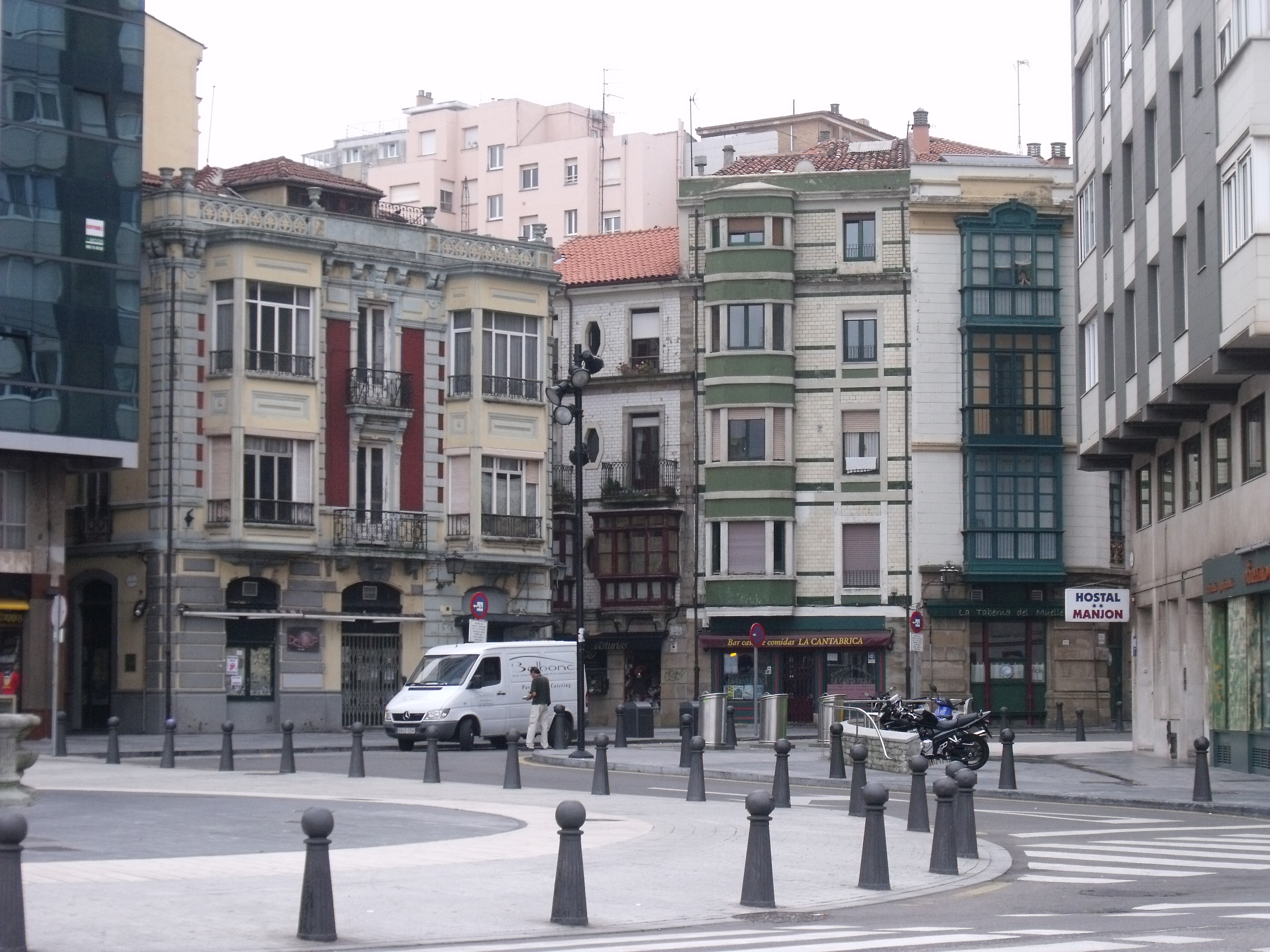 Plaza de la Barquera (Gijón, Asturias)